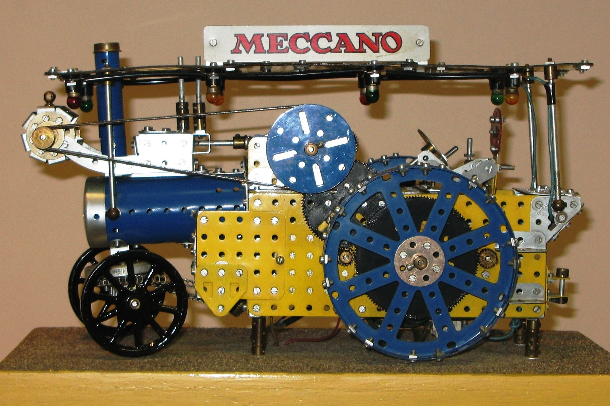 Dampmaschinn vu Meccano.